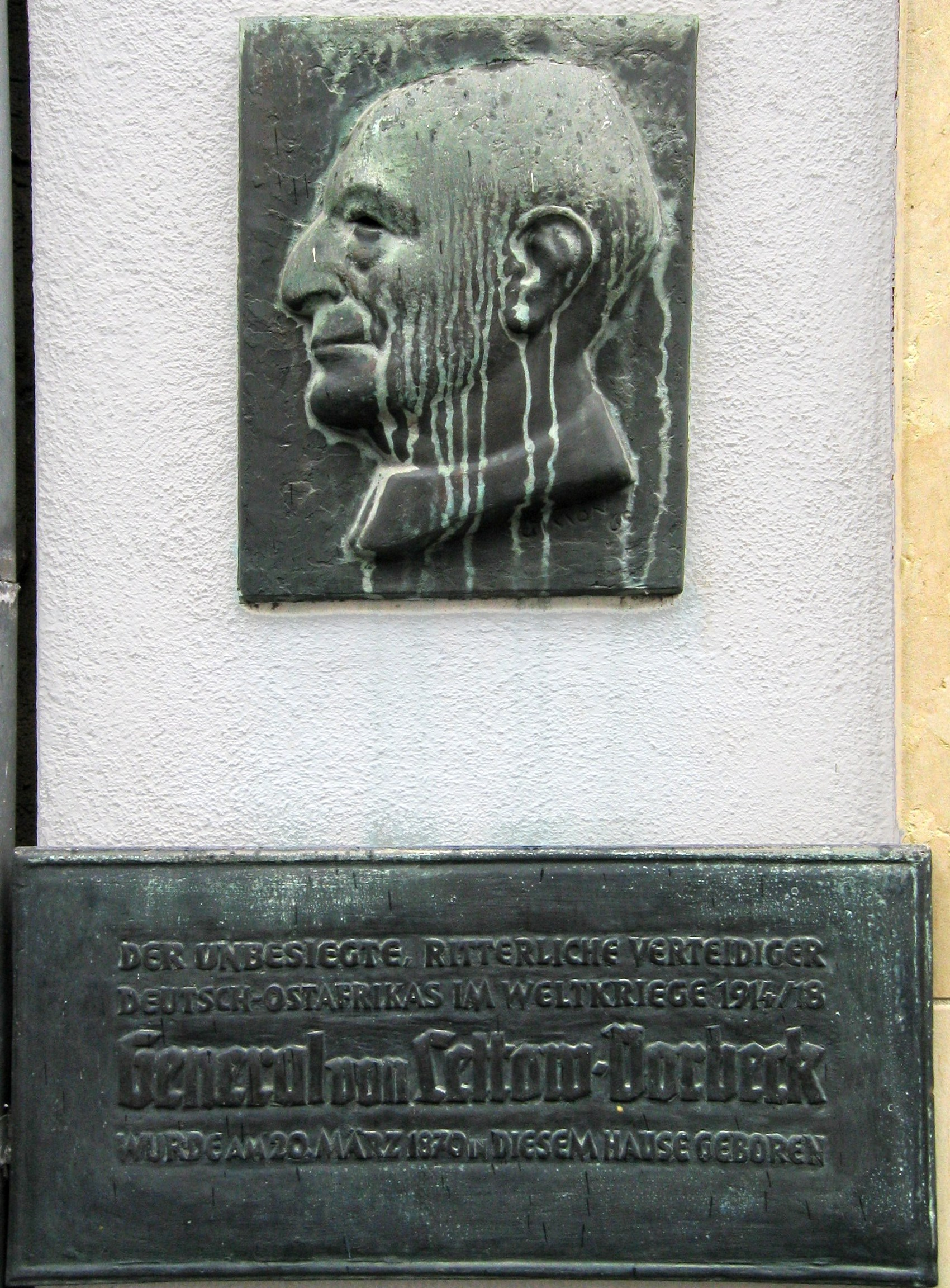 Inschrift am Geburtshaus von Paul Emil von Lettow-Vorbeck in Saarlouis